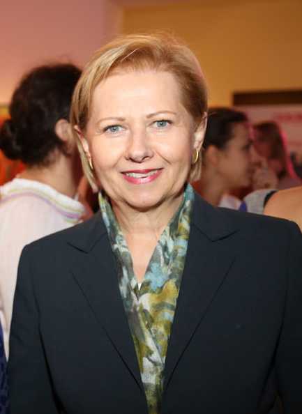 Margarete Kriz-Zwittkovits, Brigitte Jank-4843